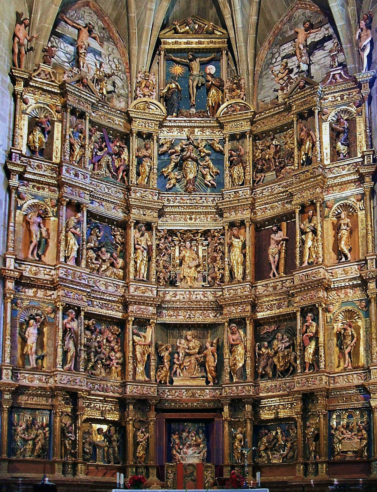 Retablo Mayor renacentista-manierista, obra del taller de Juan de Beaugrant (s-XVI) de la Iglesia parroquial de Santa María la Mayor, San Vicente de la Sonsierra, La Rioja, España/Spain